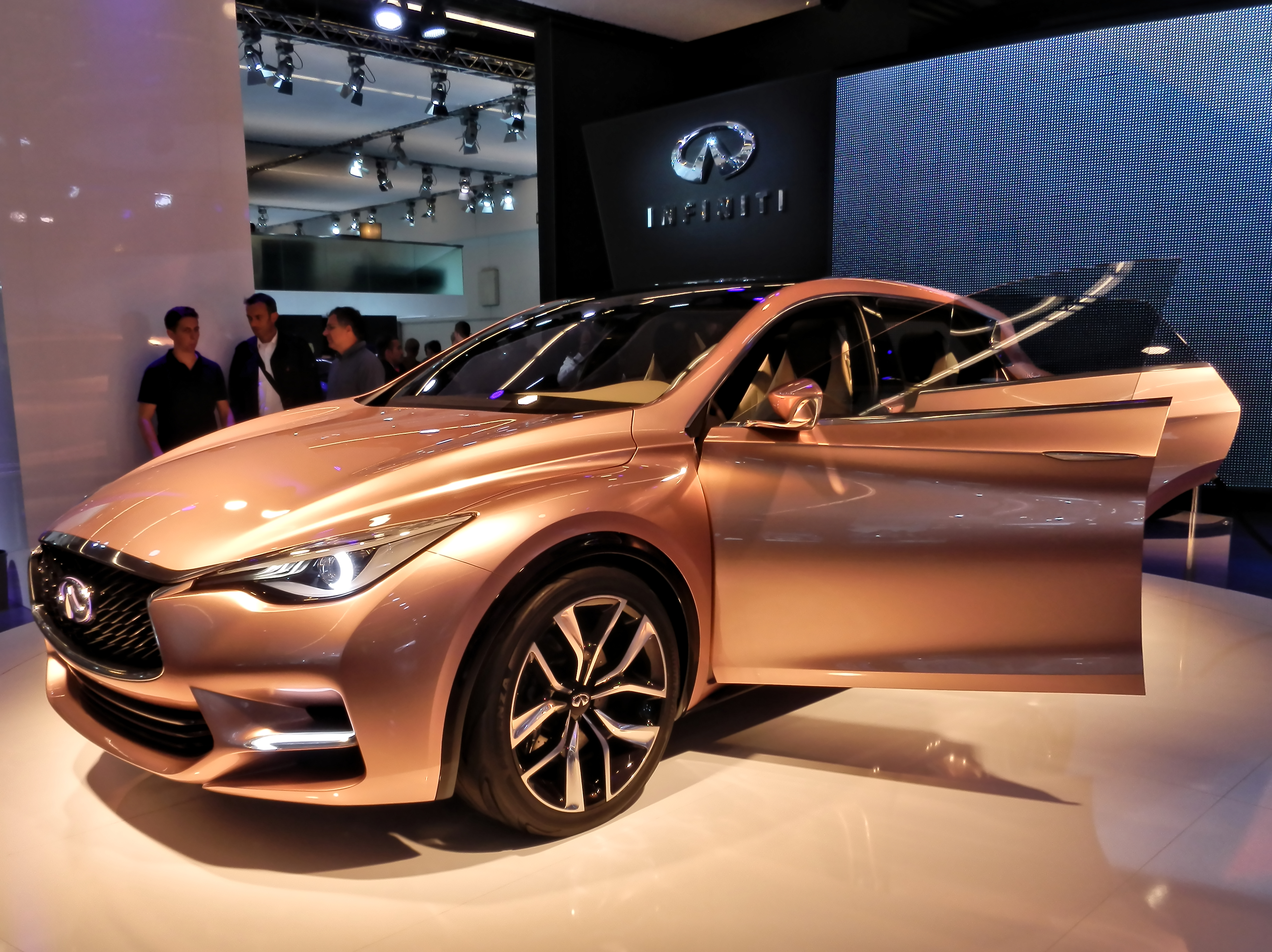 Infiniti Q30 Concept at IAA 2013